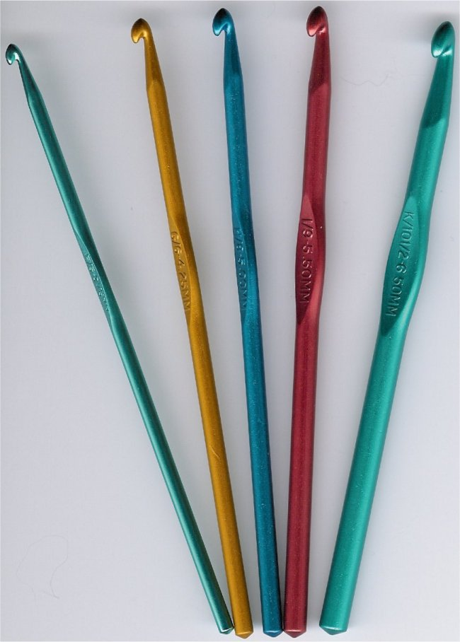 Crochet hooks